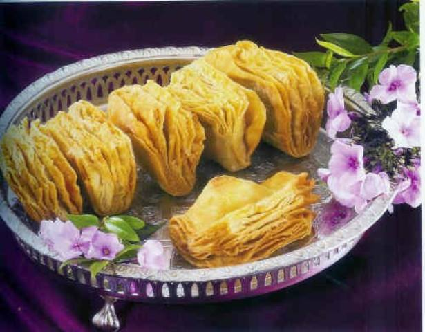 Pastelitos de Hoja, plat marocain originaire du nord du royaume.